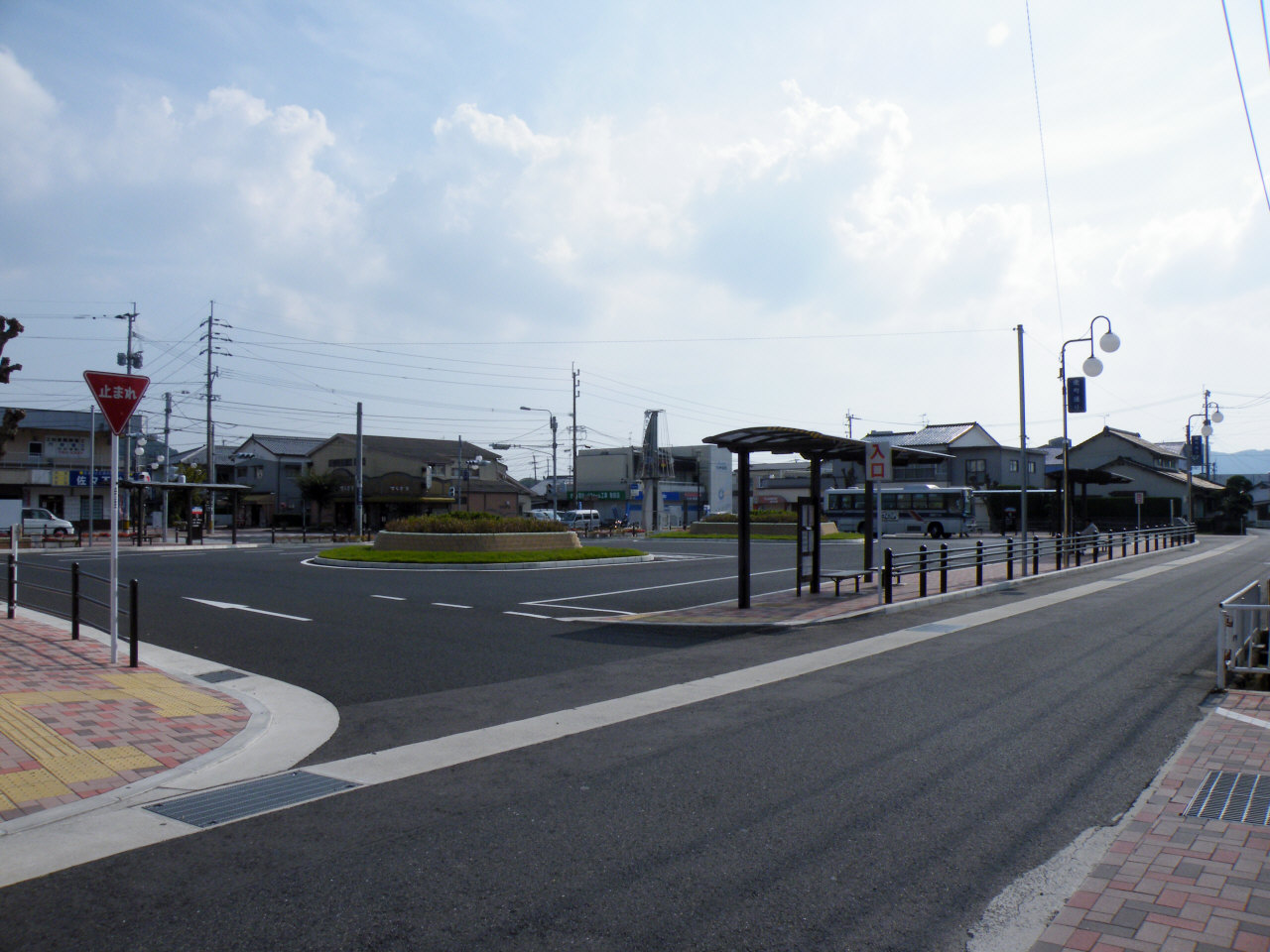 佐々バスセンター（松浦鉄道佐々駅前）